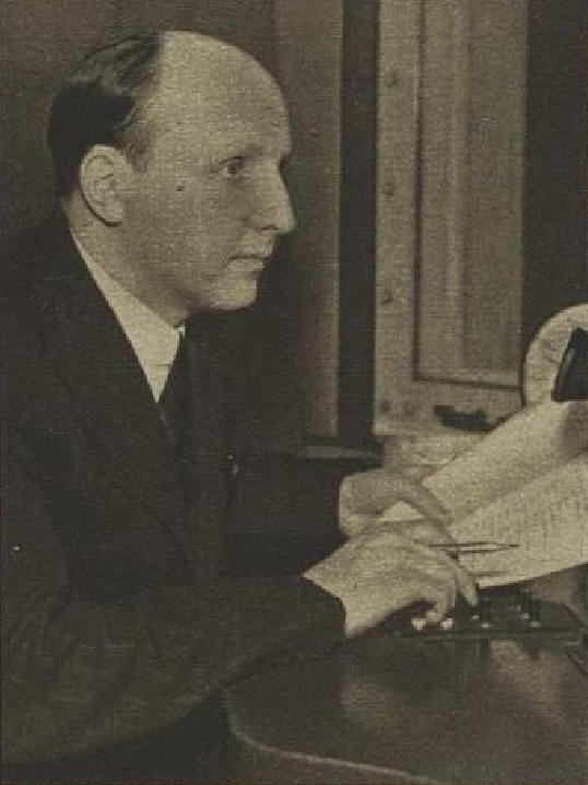 Miloslav Disman (1904-1981), divadelní a rozhlasový režisér, dramaturg a pedagog